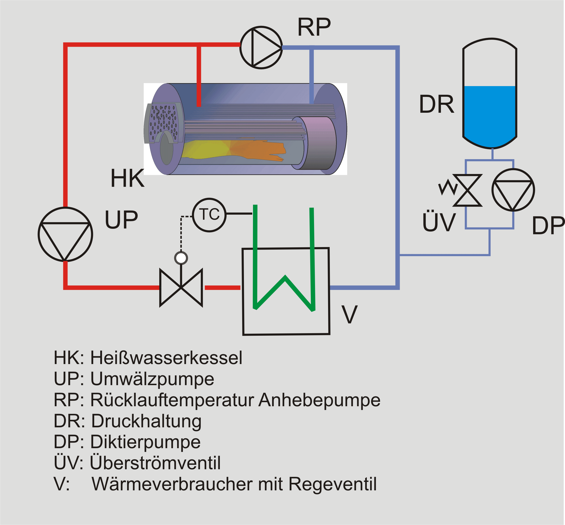 Fließbild einer Heißwasserkesselanlage mit Pumpendruckhaltung